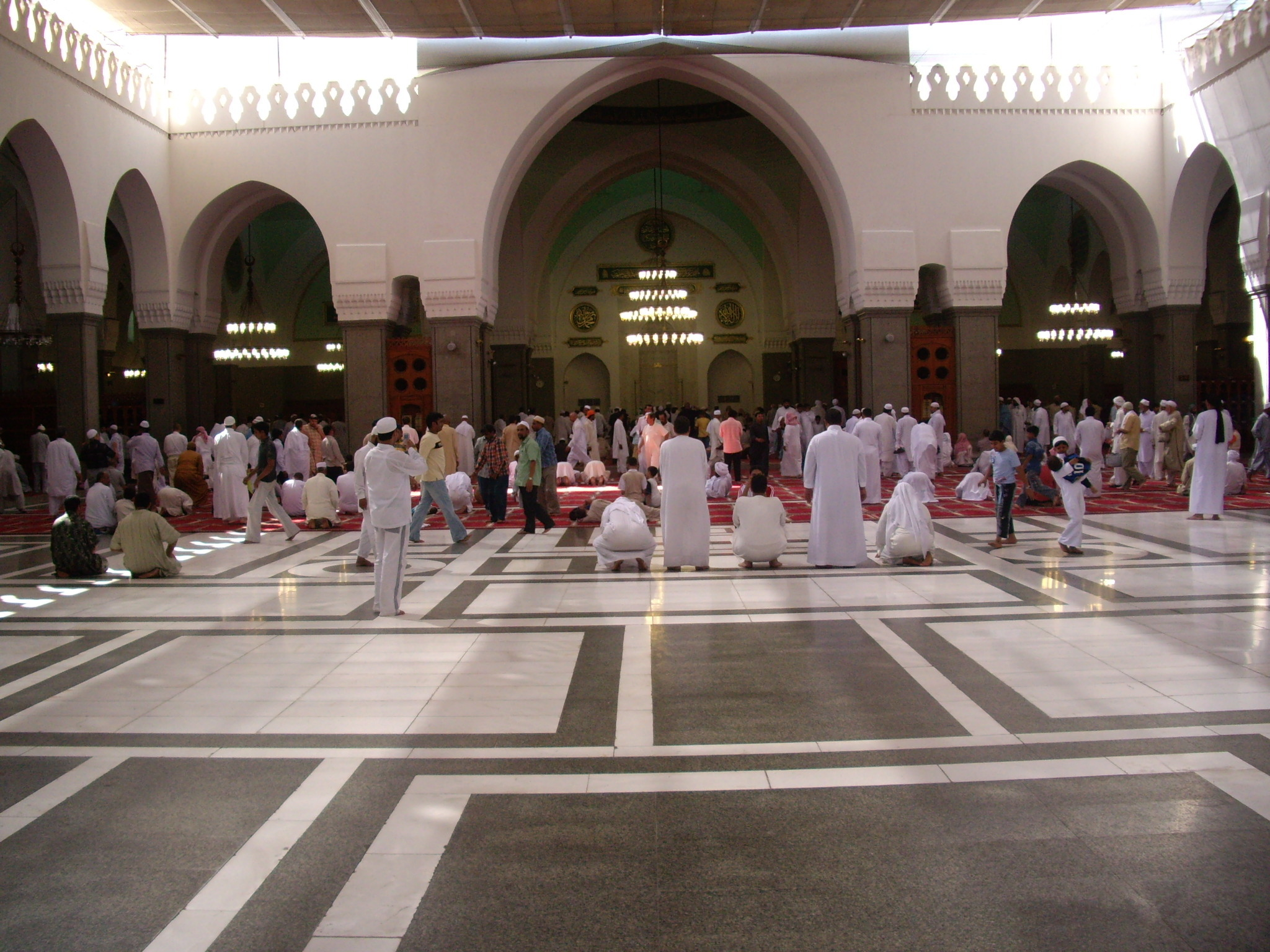 ഖുബാ മസ്ജിദ്